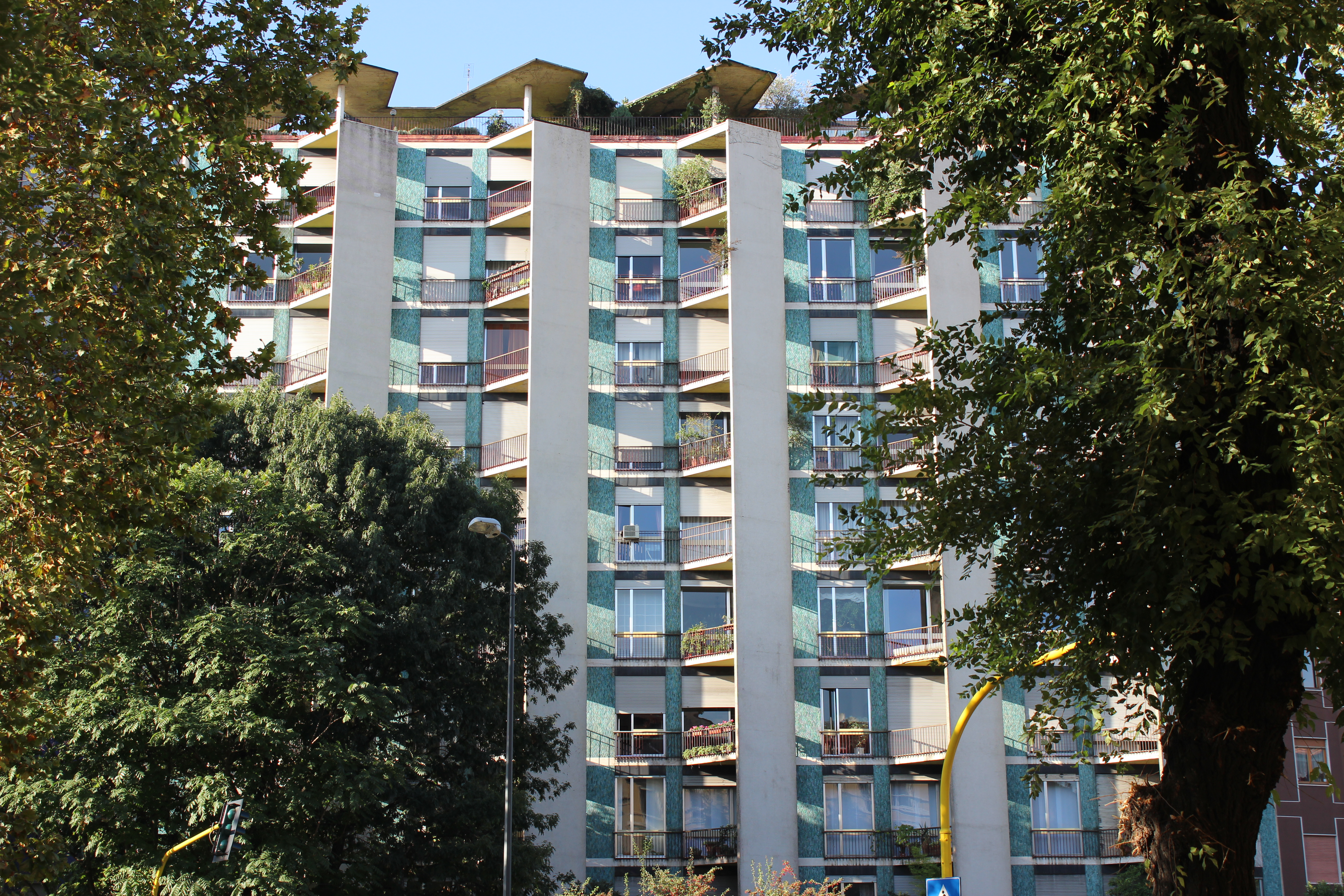 Milano, edificio residenziale in viale Beatrice d’Este 16. Fu costruito dal 1956 al 1957 su progetto di Giordano Forti e Camillo Magni.Fonte: Maurizio Boriani, Corinna Morandi, Augusto Rossari, Milano contemporanea. Itinerari di architettura e di urbanistica, Maggioli Editore, 2007, p. 214. ISBN 978-88387-4147-6 Invalid ISBN.